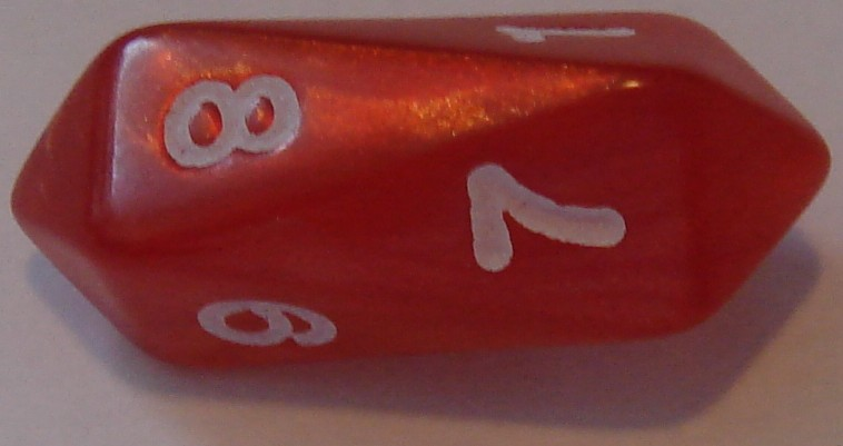 A 8-sided antiprism die